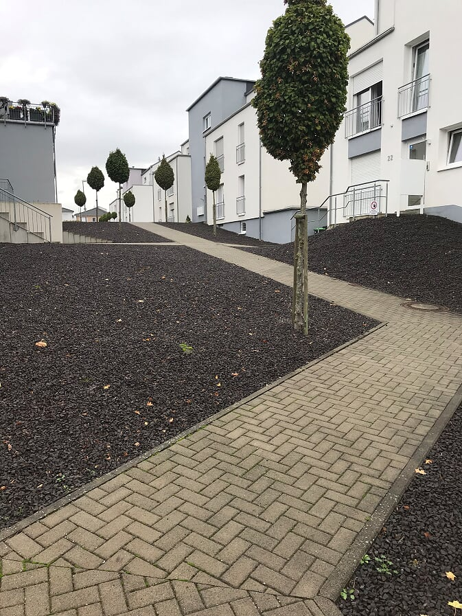 Darstellung einer nahezu komplett zugeschotterten Wohnanlage